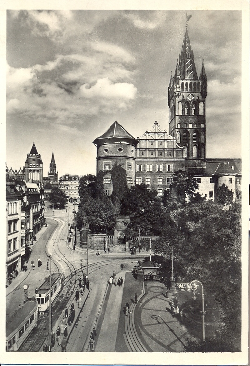 Kaiser-Wilhelm-Platz am Königsberger Schloss